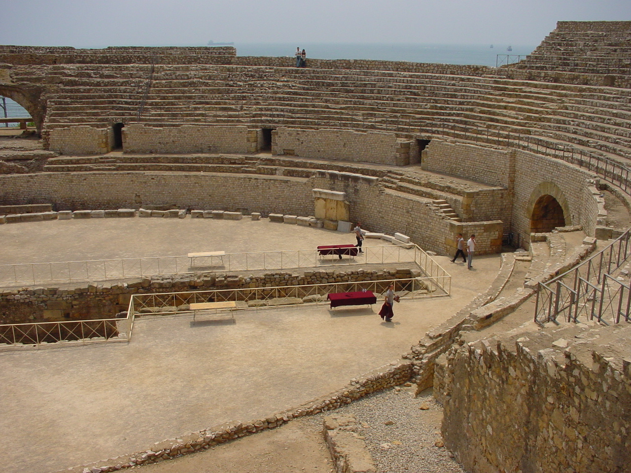 Het romeinse anfitheater van Tarragona